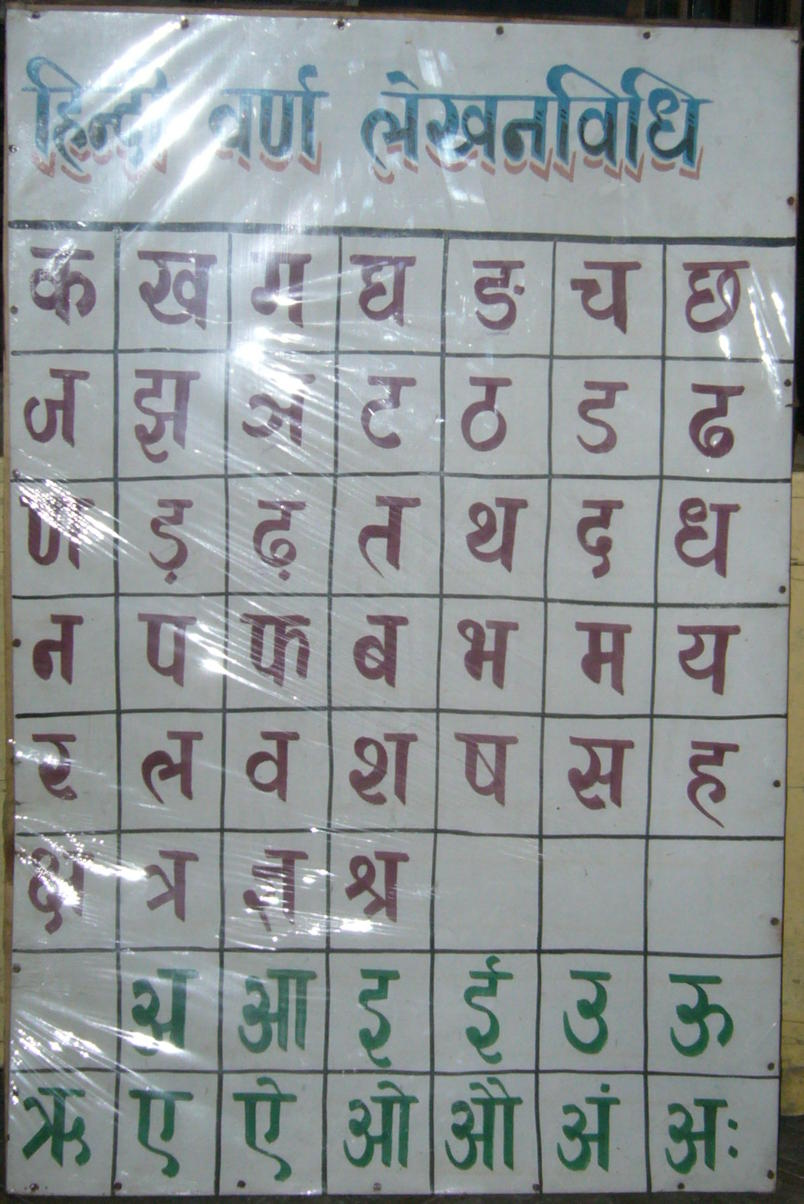 Devanagari varnamala